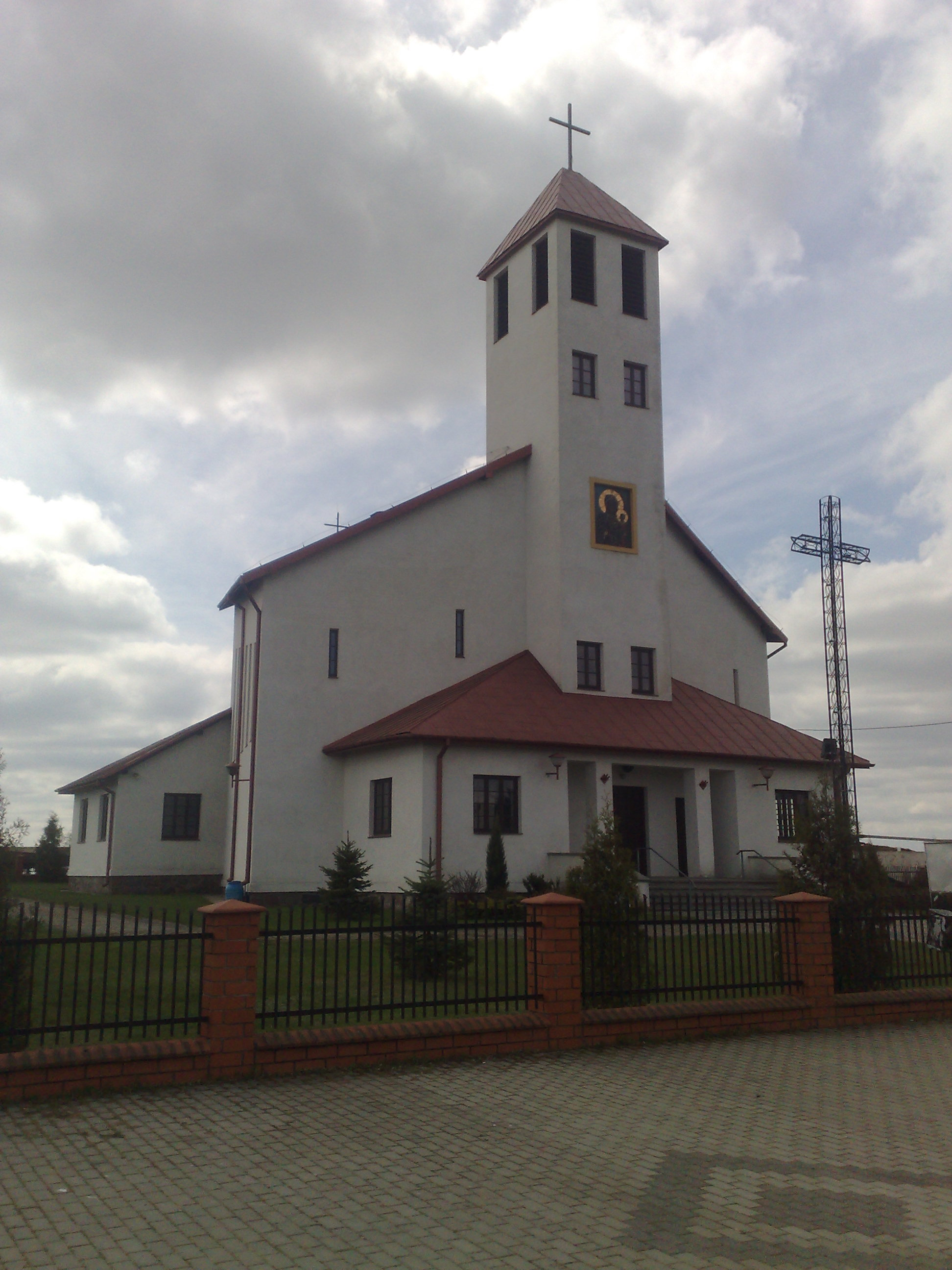 Krynica-Kosciol-1